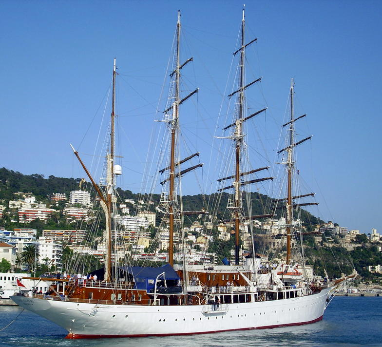 Le Sea Cloud I (ex Hussar II) , quatre-mâts barque bazttant pavillon maltais.